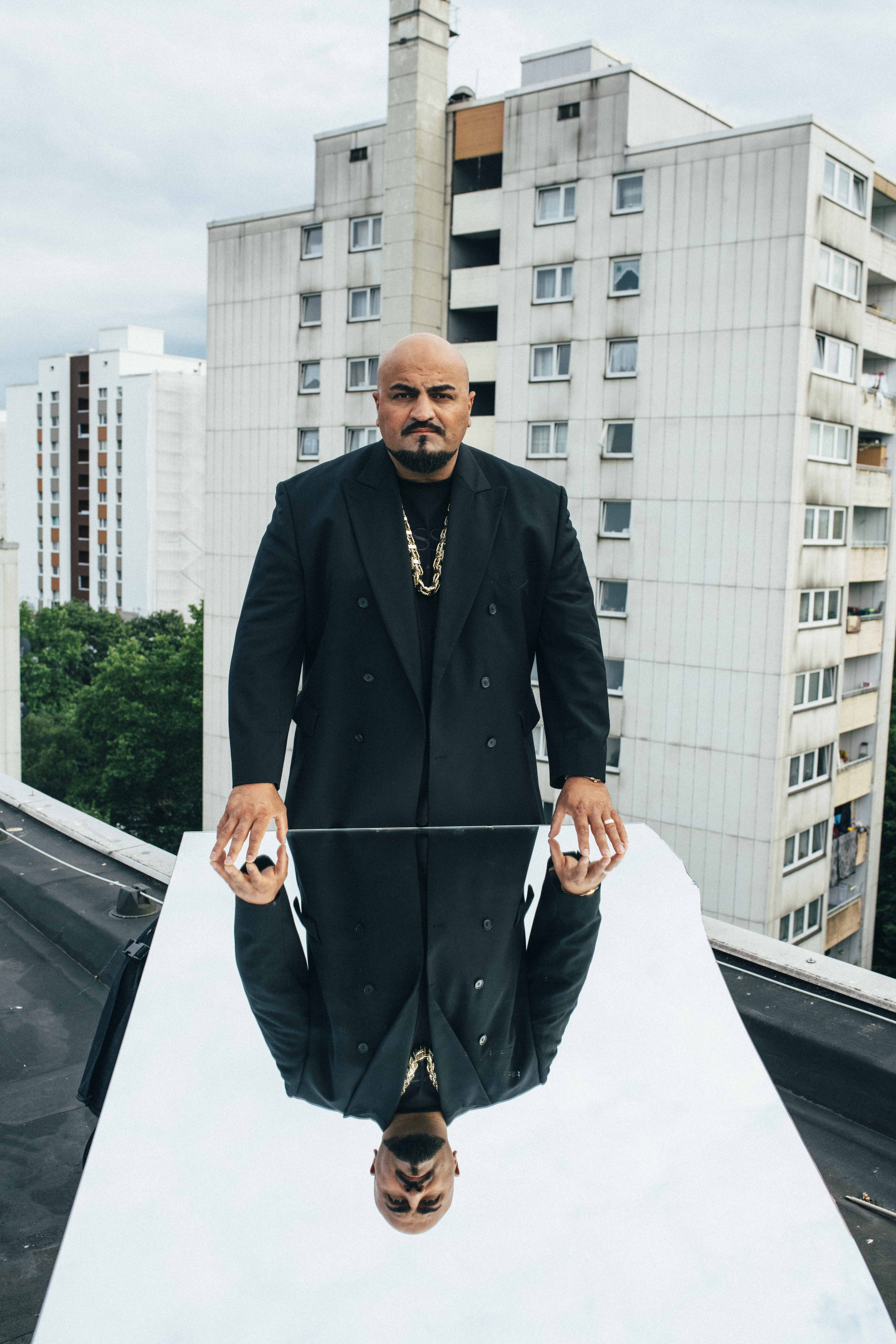 Xatar